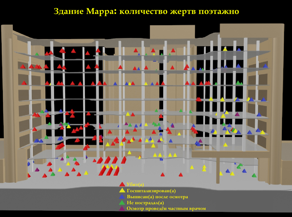 Диаграмма расположения жертв в здании Альфреда Марра во время теракта в Оклахома-Сити. Красными треугольниками обозначены погибшие, желтыми - госпитализированные, синими - осмотренные в больнице, зелеными - не пострадавшие, лиловыми - посещавшие личного врача, вследствие чего данные закрыты.